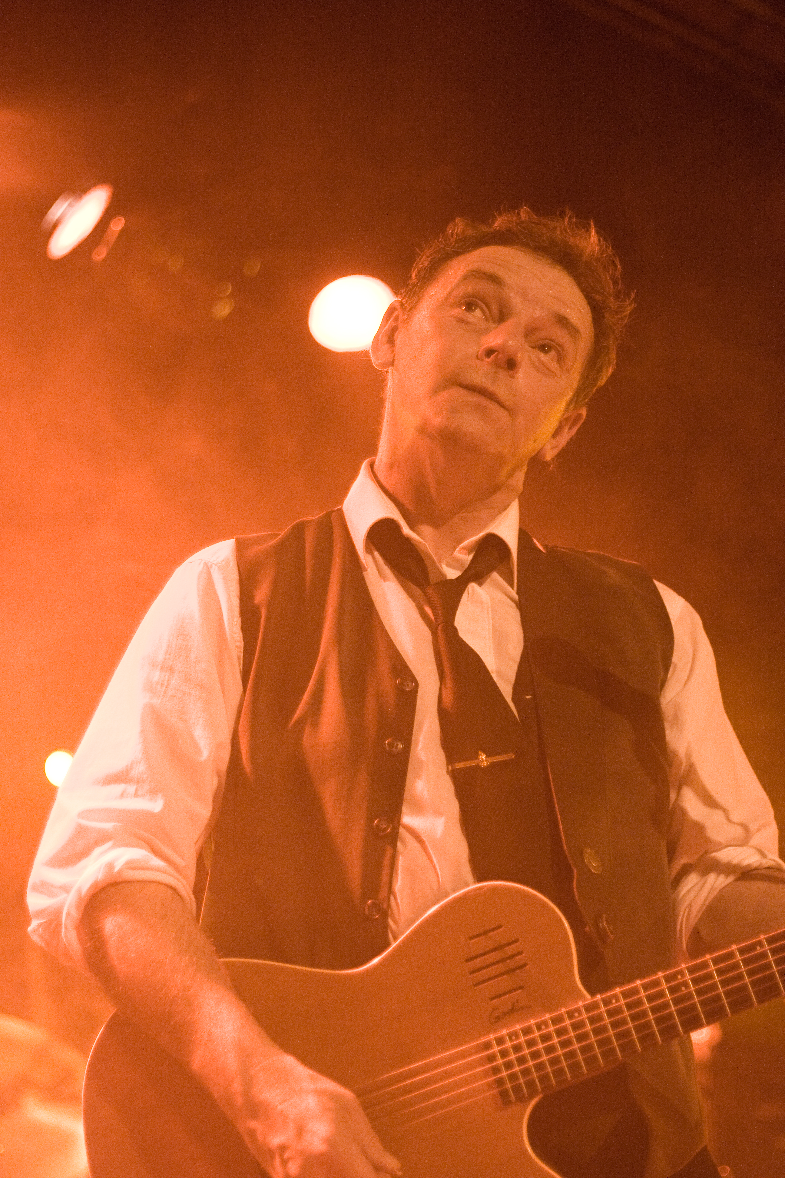 Concert de Soldat Louis, à Monthey. Renaud Detressan